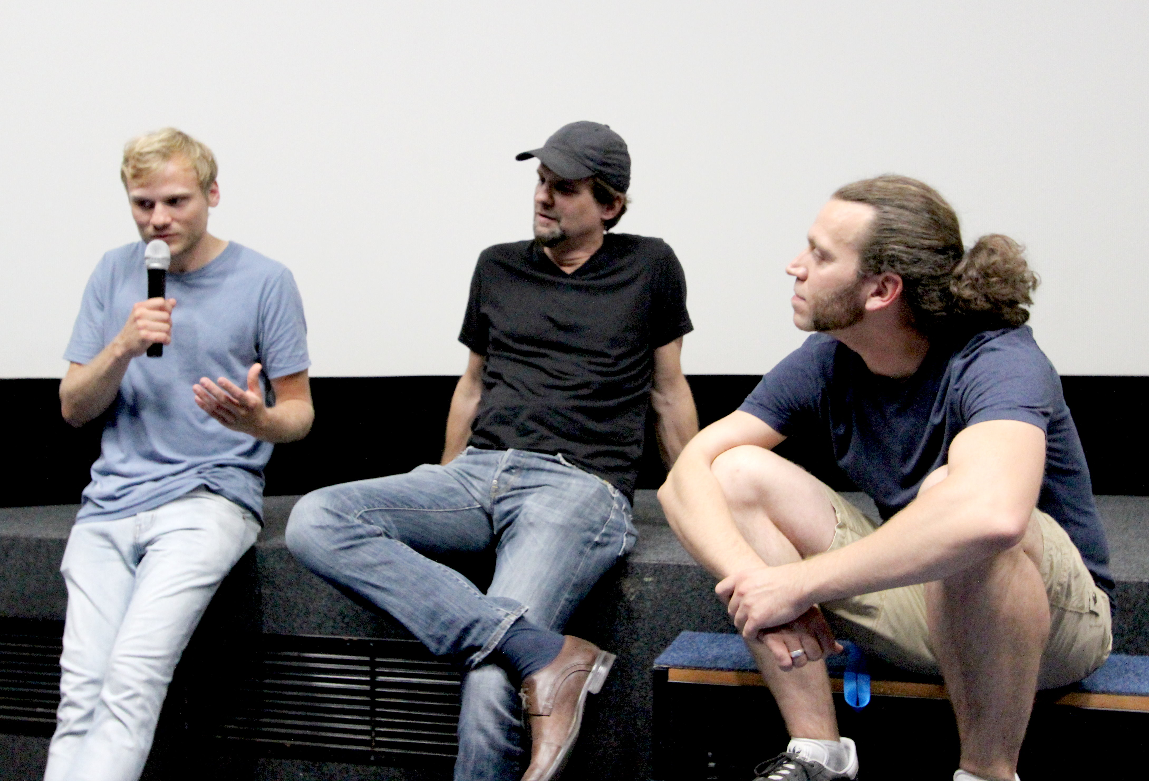 40223 Düsseldorf, Brunnenstraße 20. Filmvorstellung "303" im Metropol-Filmkunstkino. V.l.n.r.: Anton Spieker (Schauspieler), Hans Weingartner (Regisseur), Daniel Bäldle (Theaterleiter). Aufnahme von 2018.